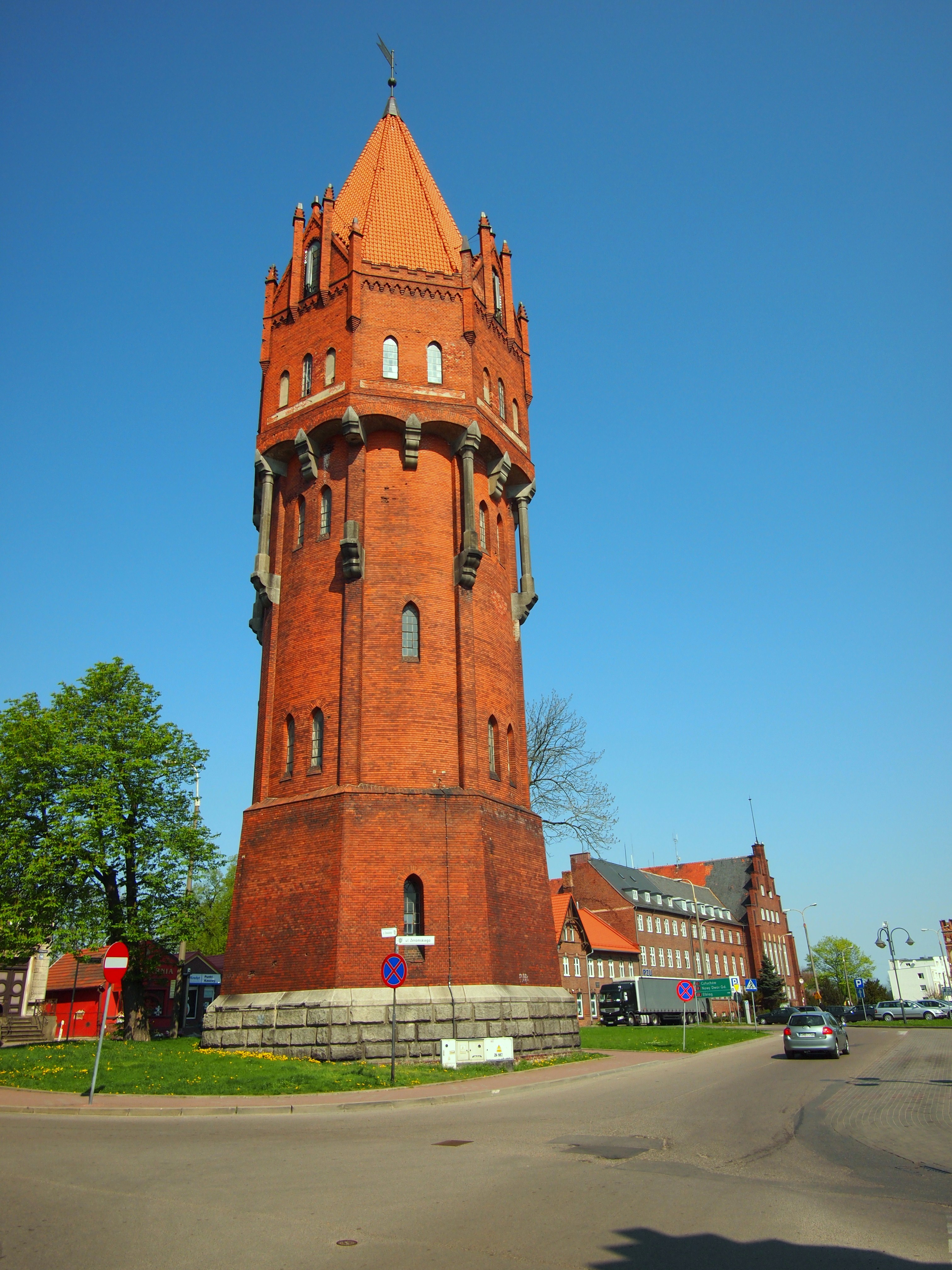 Malbork, wodociągowa wieża ciśnień (komunalna), pl. Słowiański 15.